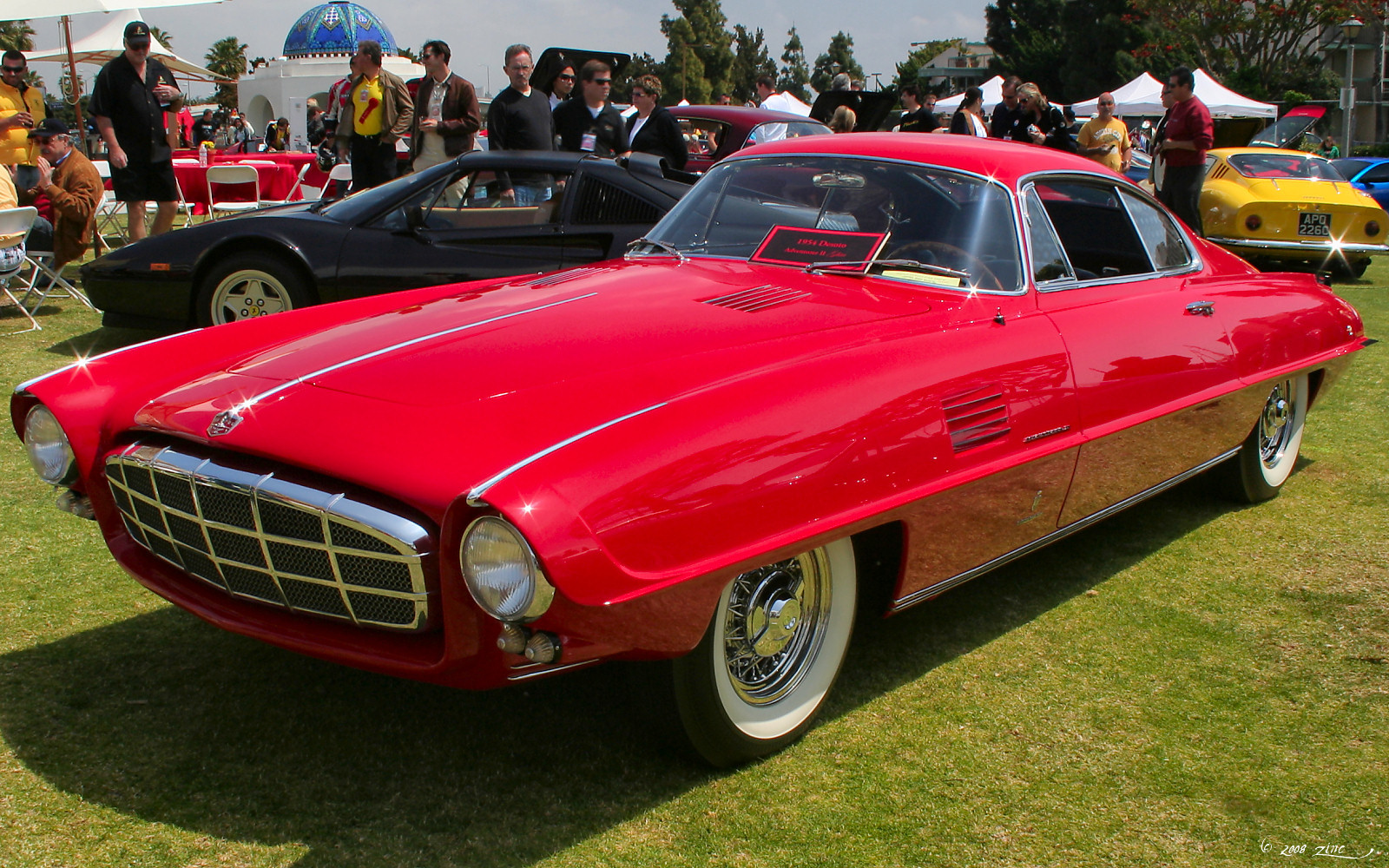 Spanish Landing Park Bella Italian 2008